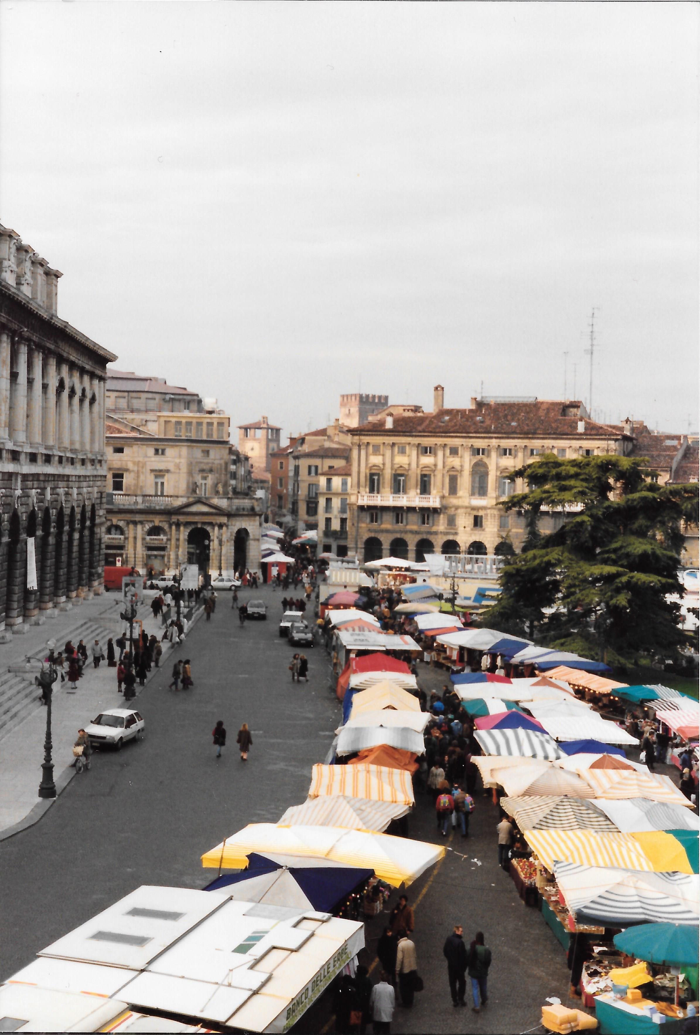 Nel mese di Dicembre tra il 10 e la mattina del 14 la fiera di Santa Lucia in Piazza Bra è un tradizionale mercatino in occasione della Festa di Santa Lucia This is a photo of a monument which is part of cultural heritage of Italy.